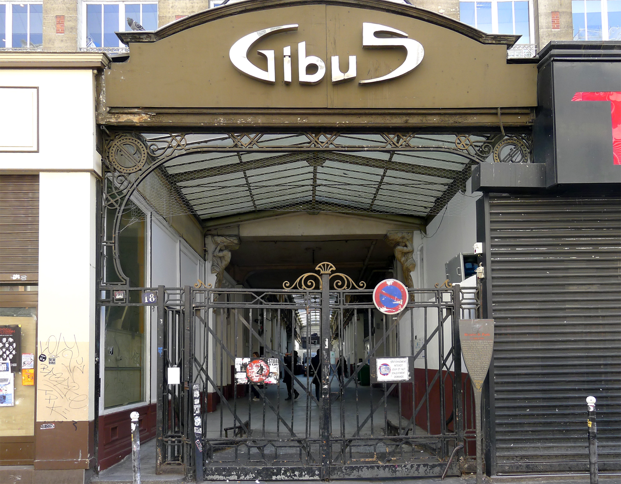 Rue du Faubourg-du-Temple (n18 entrée avec la pancarte du Gibus) - Paris XI